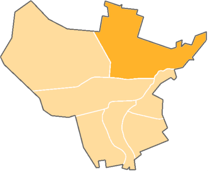 Łagisza